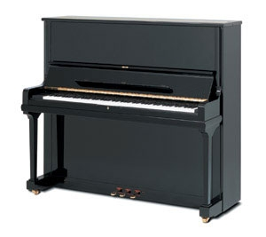 Foto eines Pianinos in schwarz poliert